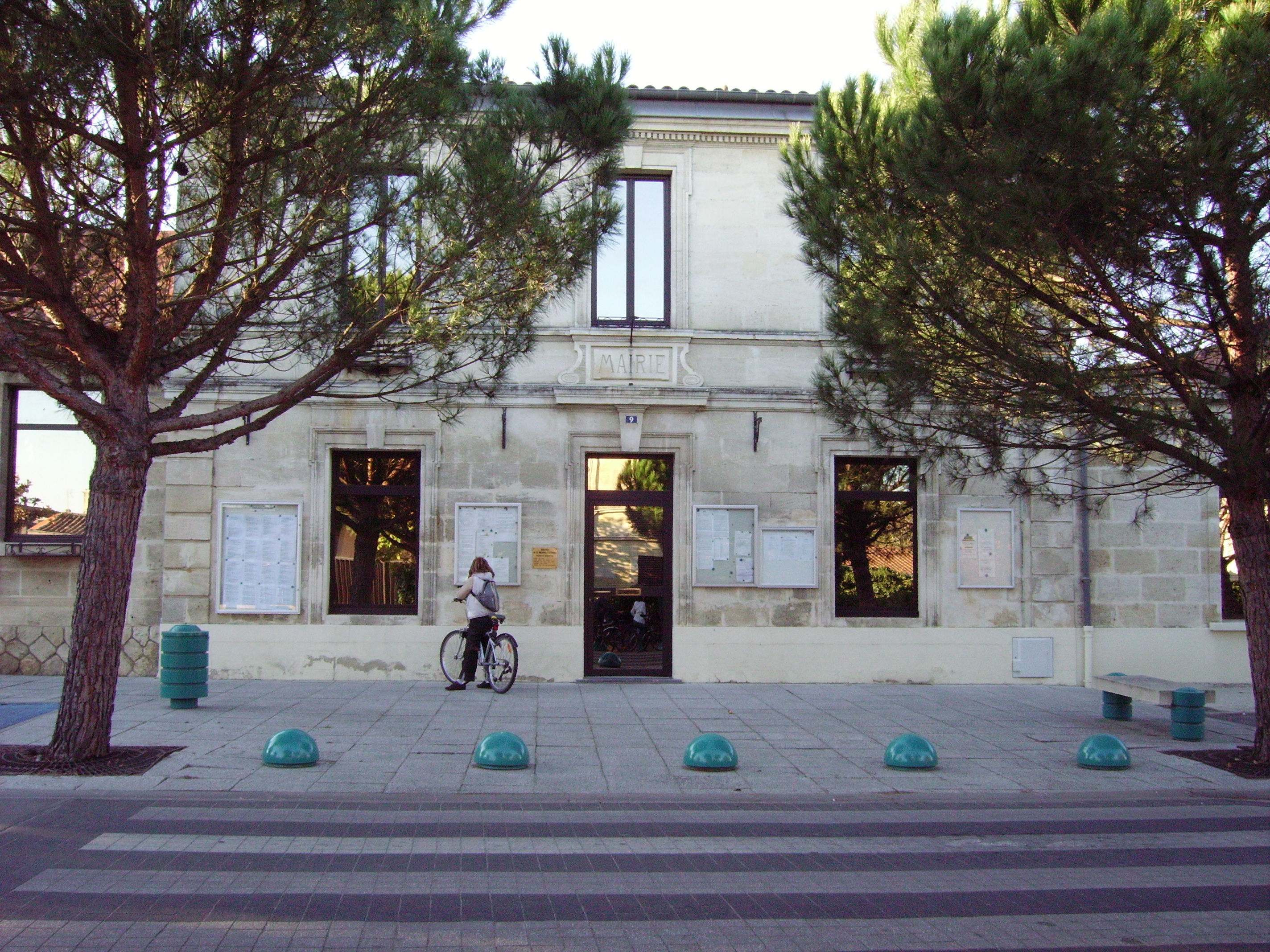 Mairie de saint médard d'Eyrans